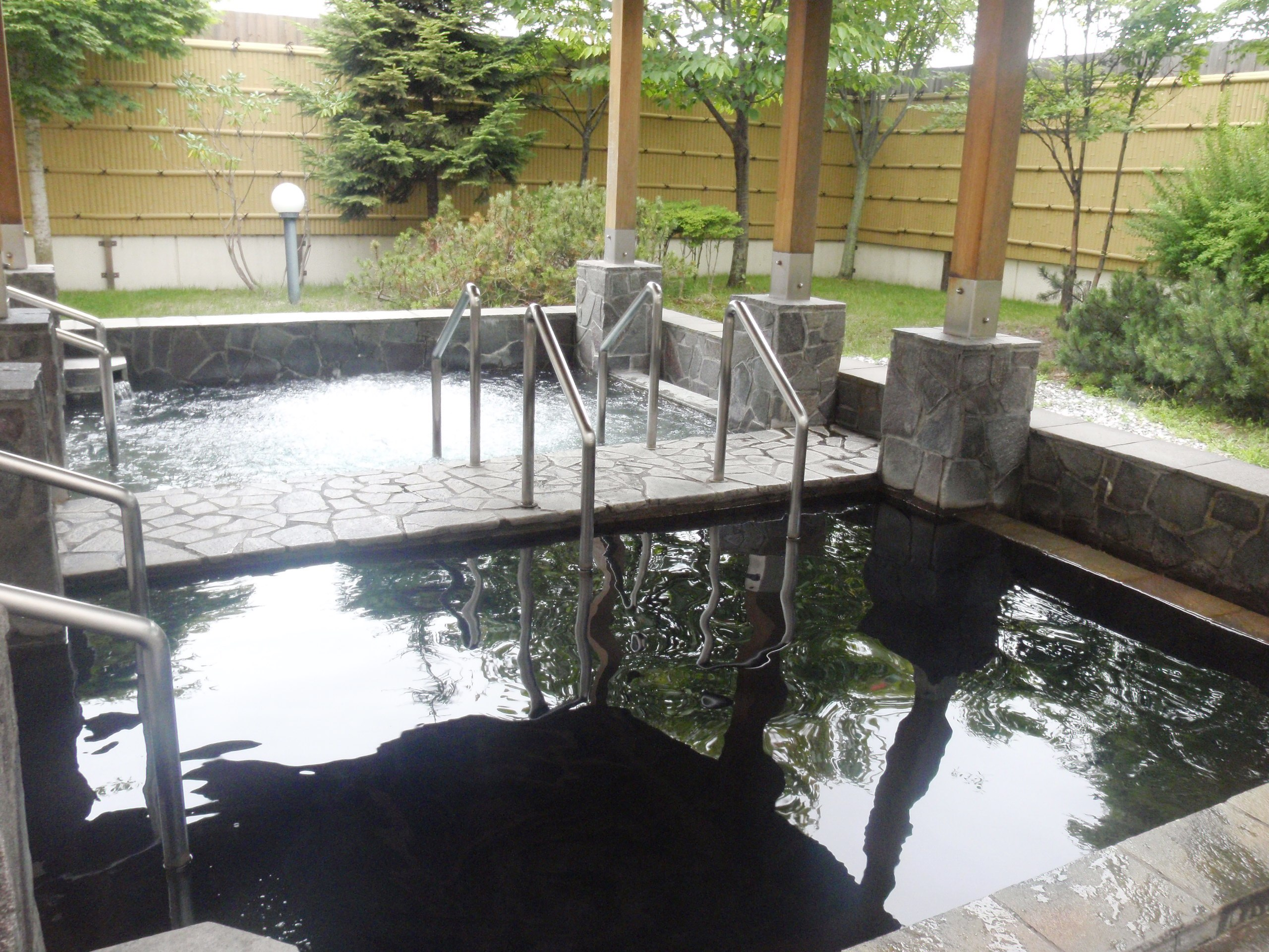 門別温泉露天風呂